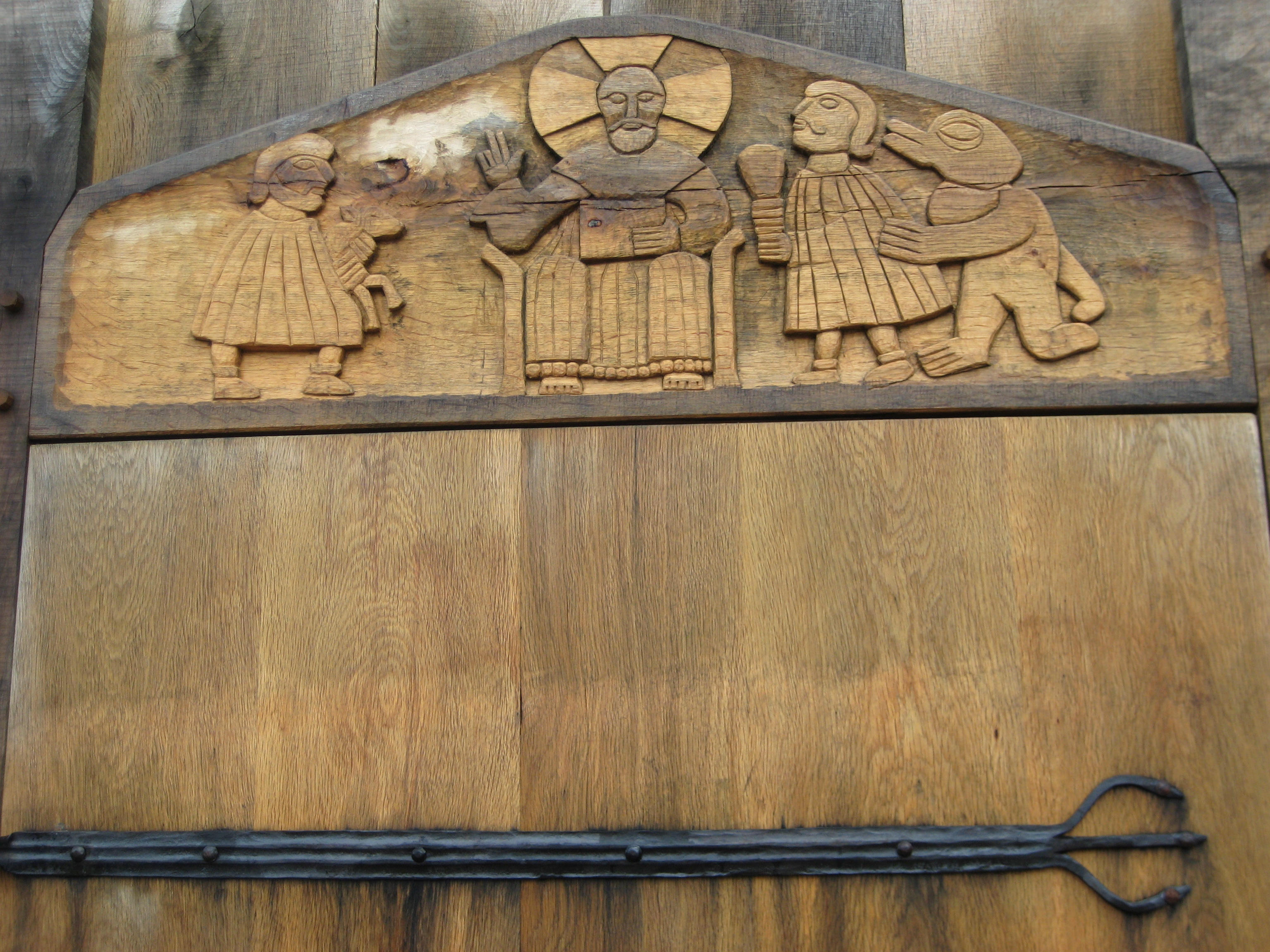 St. Nikolai, Schnitzerei oberhalb der Eingangstür